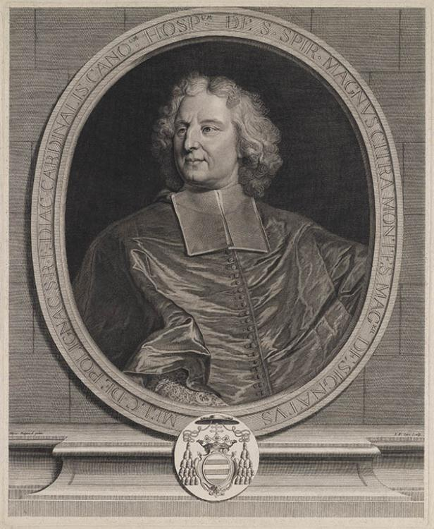 Estampe représentant le cardinal Melchior de Polignac (1661-1741)